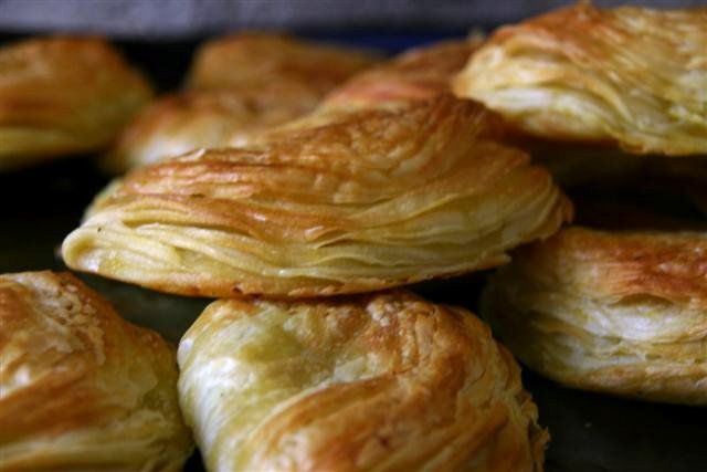 Pastéis de Chaves, uma famosa especialidade da cidade de Chaves.